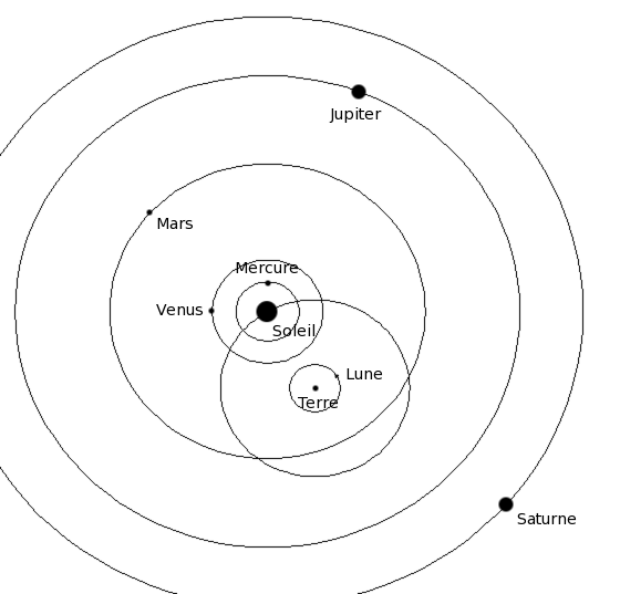 Description : Système de Tycho Brahé. Source : Dhenry ; schéma personnel. Licence : Sun and moon revolve around earth, planets revolve around sun.